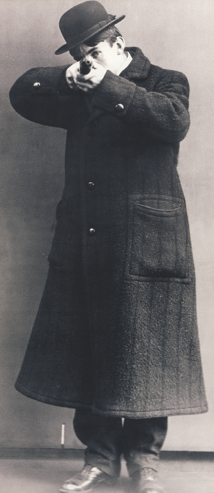 O anarquista expropriador francês Andre Soudy, membro do Bando Bonnot, em 1911.